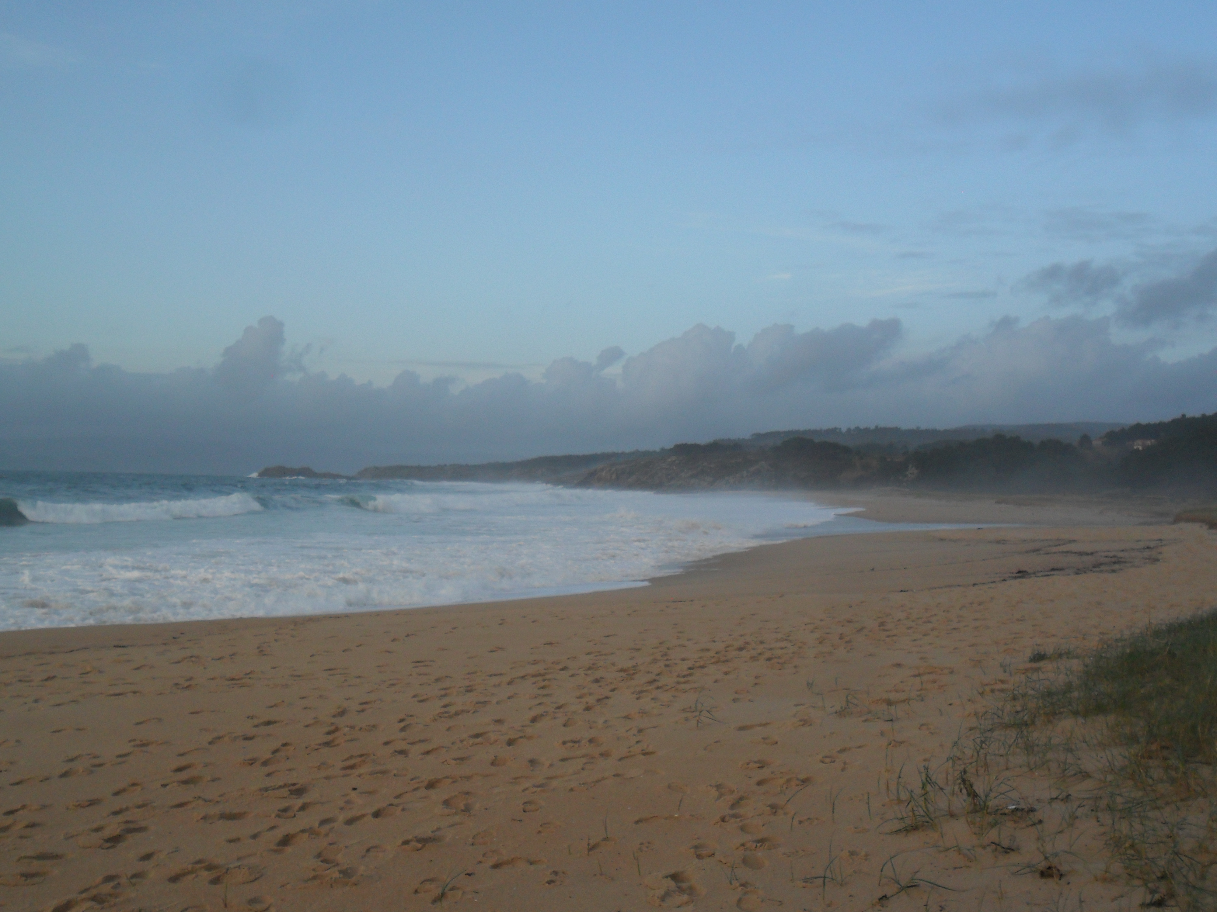 Praia Sonense de Quiruga